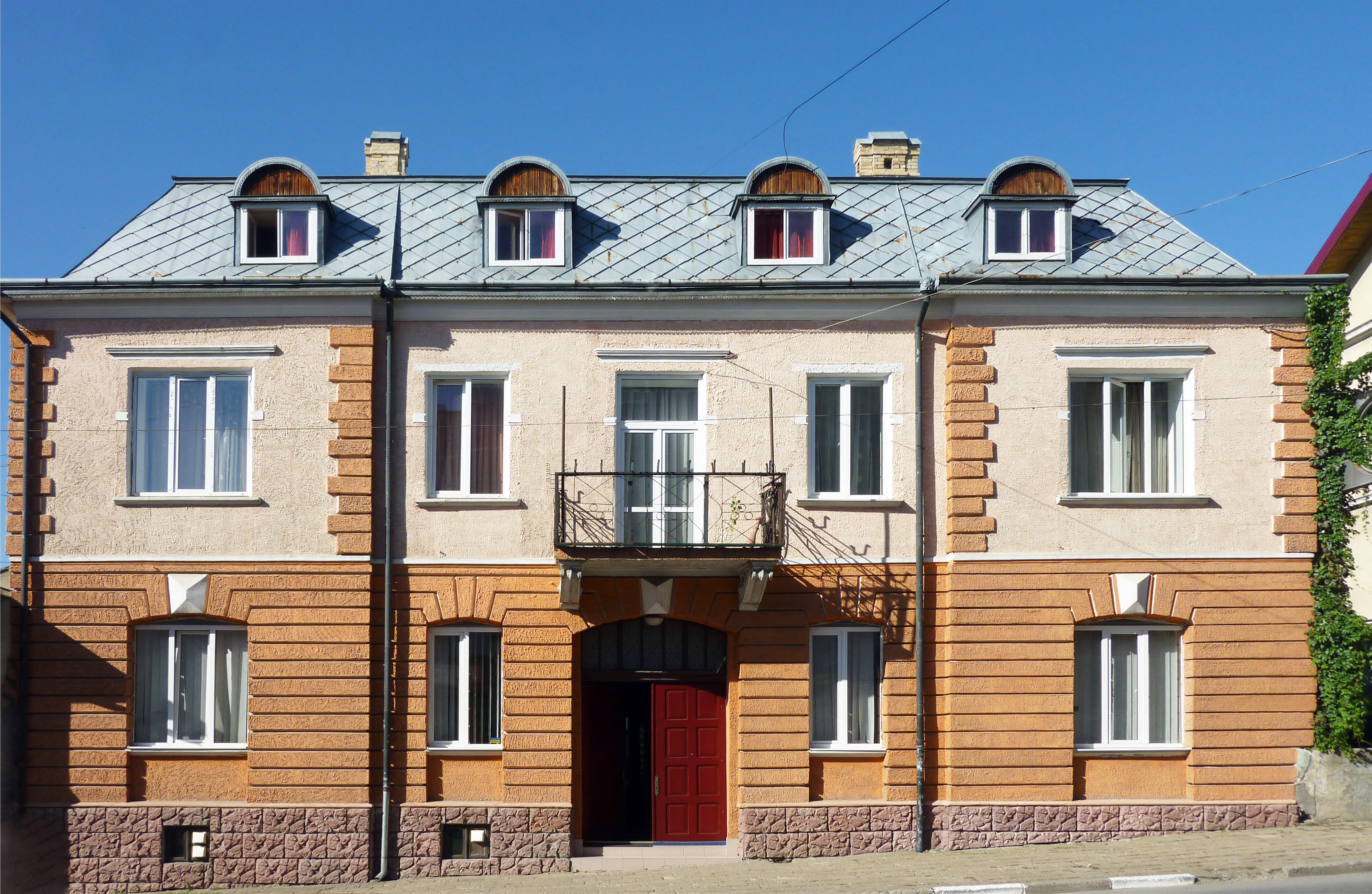 У будинку під №9 тривалий час проживав лікар Іван Куровець. Сам будинок, у якому жив Іван Куровець, у часи СРСР використовувався як гуртожиток, а зараз тут офіси декількох фірм.